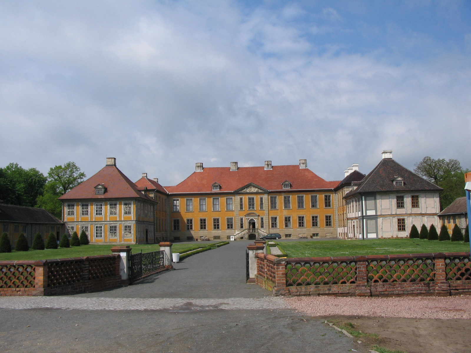 Schloss Oranienbaum Ehrenhofseite